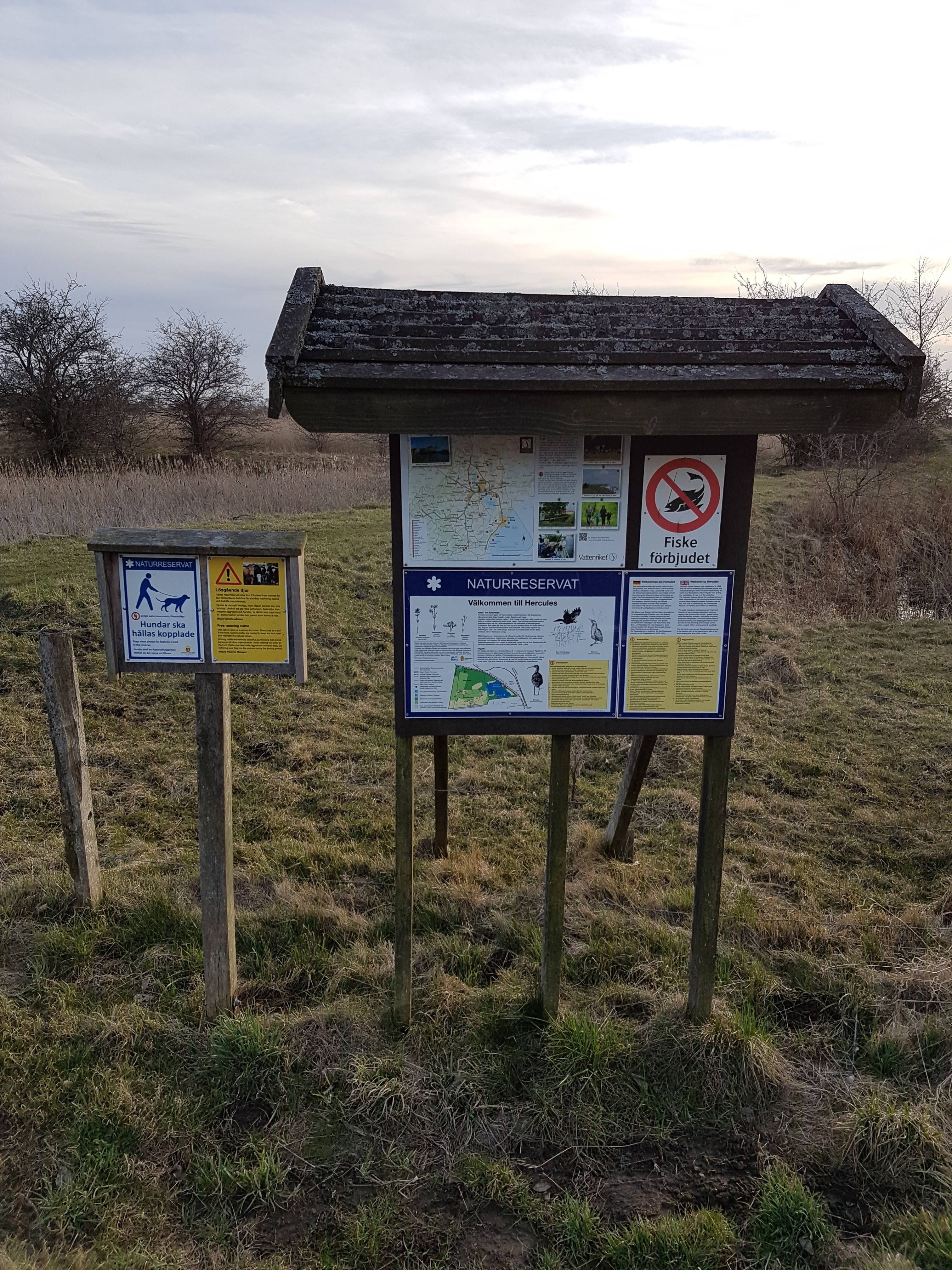 Informationstavla vid Hercules naturreservat i Kristianstads kommun i mars 2017.